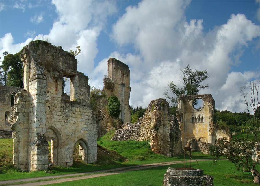 Abbaye Royale de Mortemer, Eure, Normandie, France.